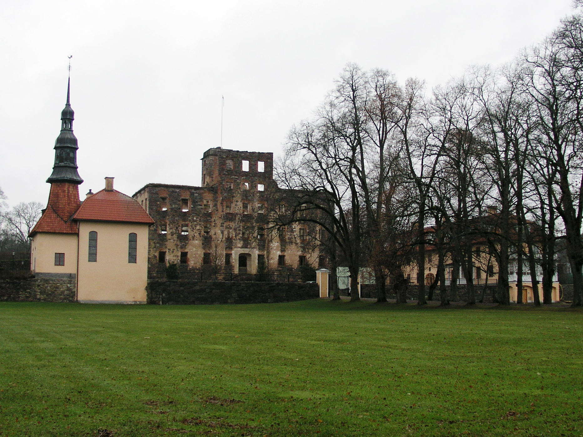 Stjärnorp castle, Linköpings kommun, Sweden